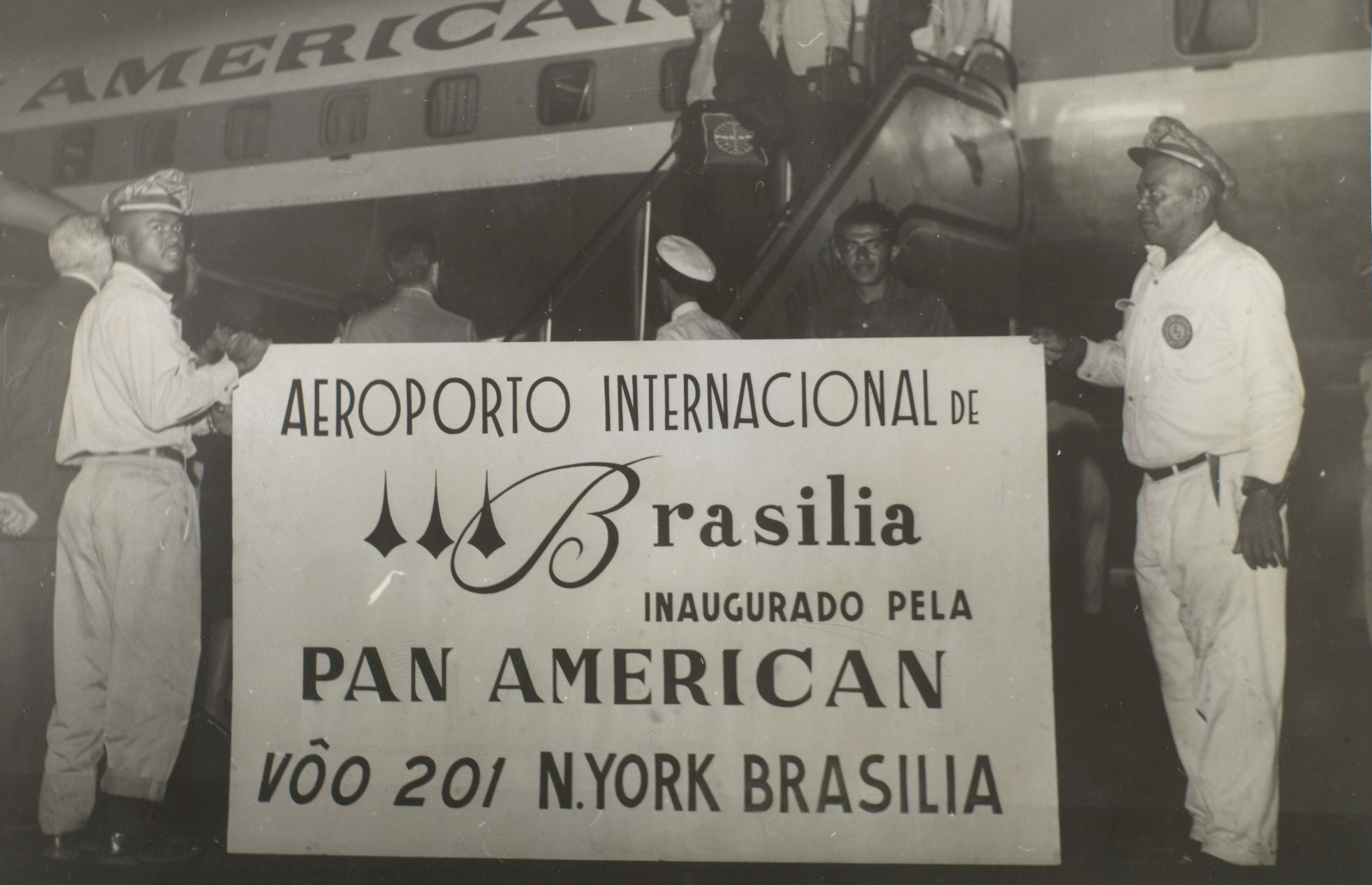 Fotografia do Fundo Correio da Manhã, sob a guarda do Arquivo Nacional.